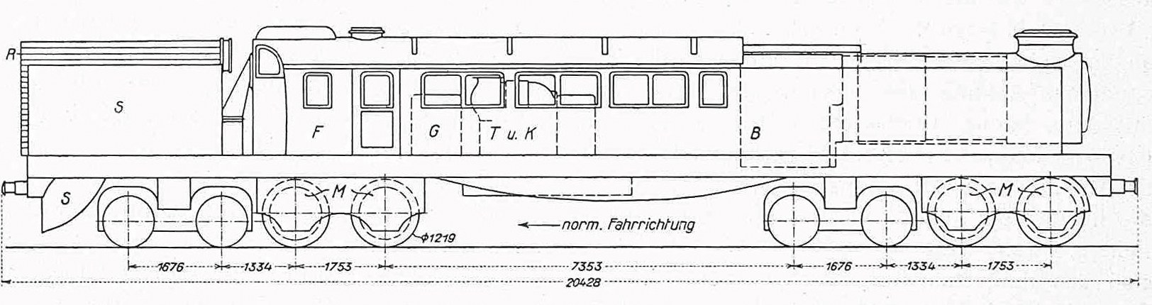 Lokomotive von Reid und Ramsay mit turbo-elektrischem Antrieb. Aufriss. Legende: B Kohlen und Wasser, F Führerstand, G Generator, T Turbine, K Kondensator, M Motoren, S Luftfänger, R Rohrbündel.